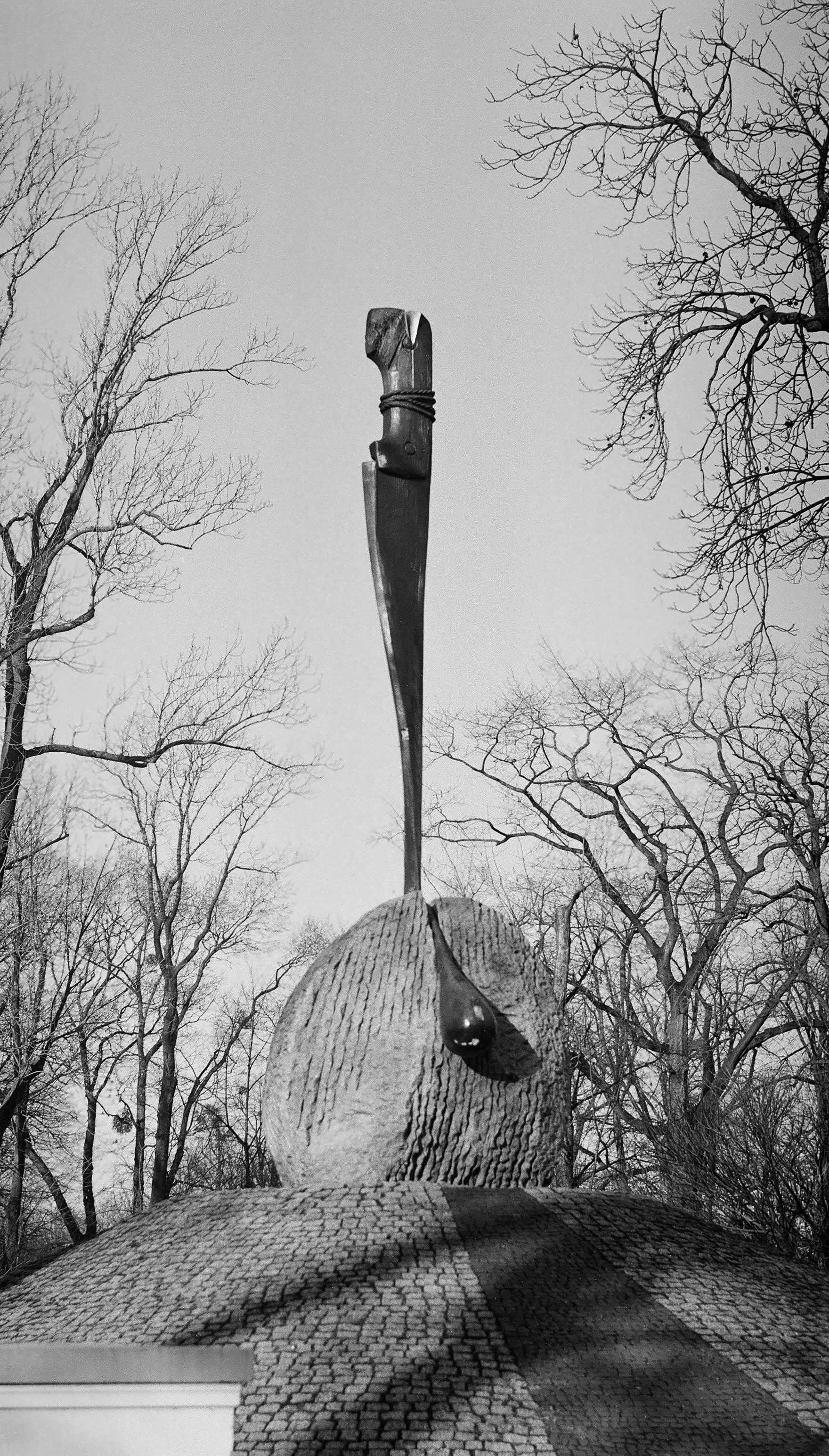 Pomnik ofiar wojen i totalitaryzmu w parku im. Fryderyka Chopina w Gliwicach